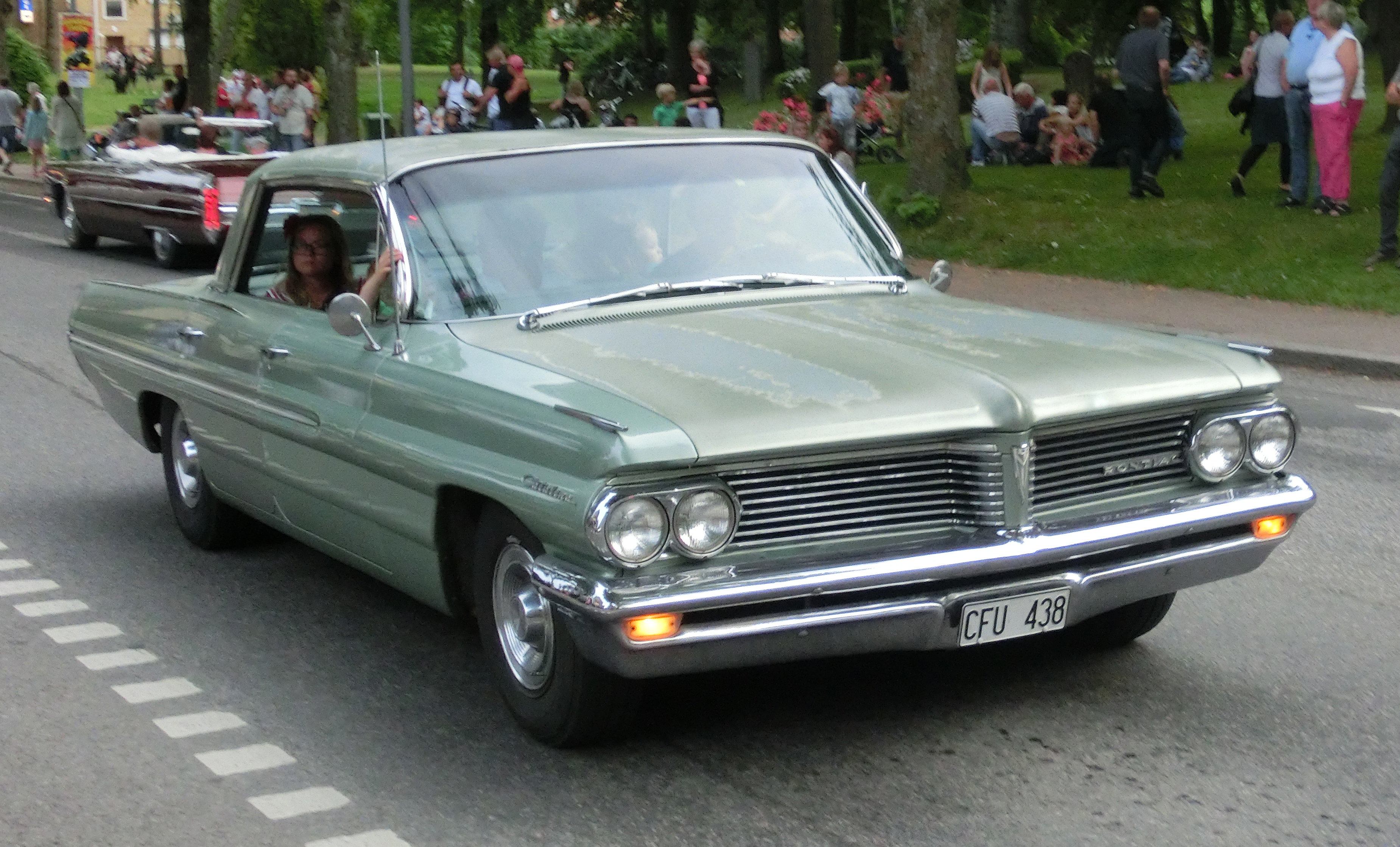 En Pontiac Catalina 1962 på cruising på Ströget (Sankt Olofsgatan) i Falköping 2013-07-27.